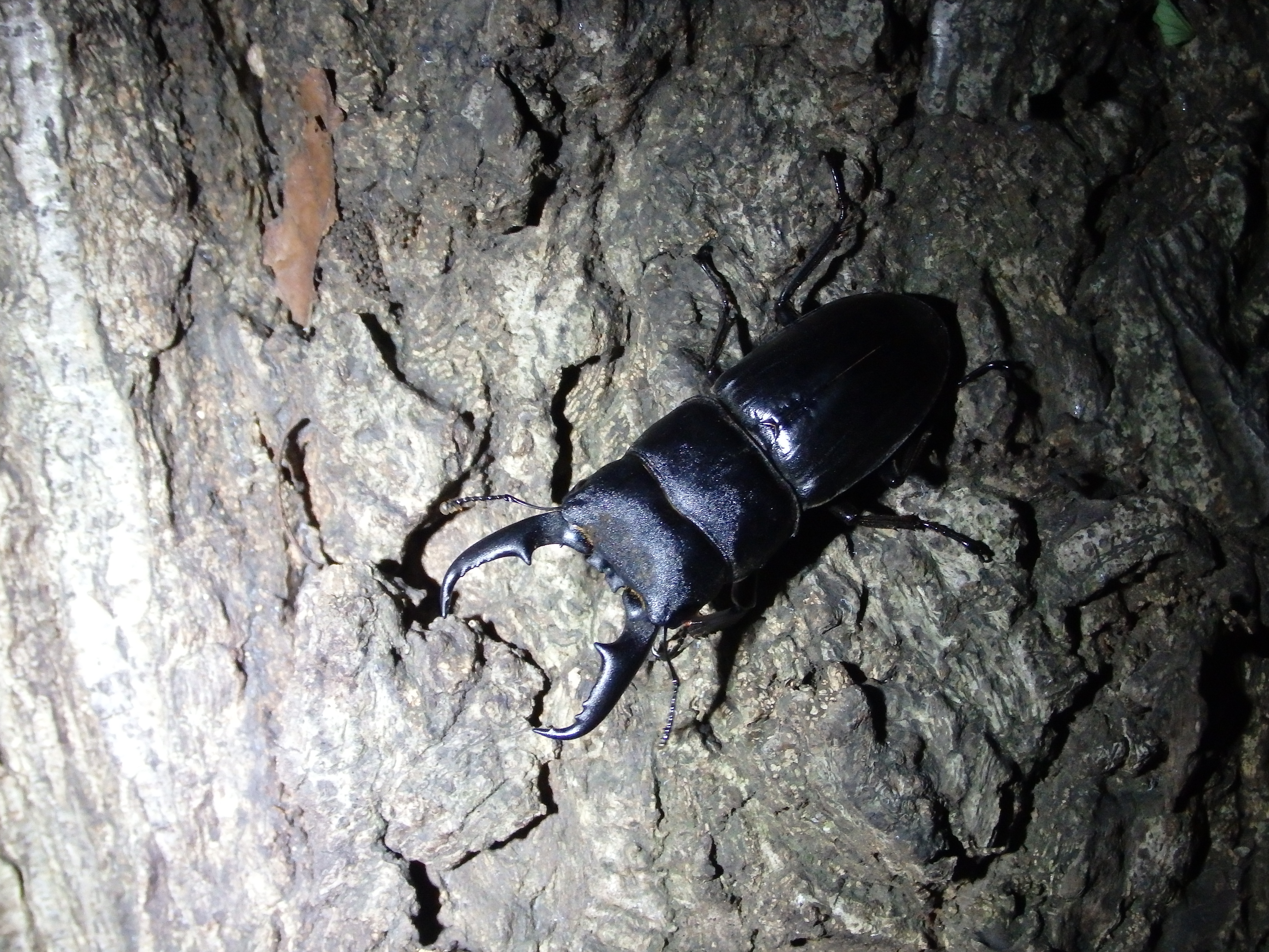 撮影：東京